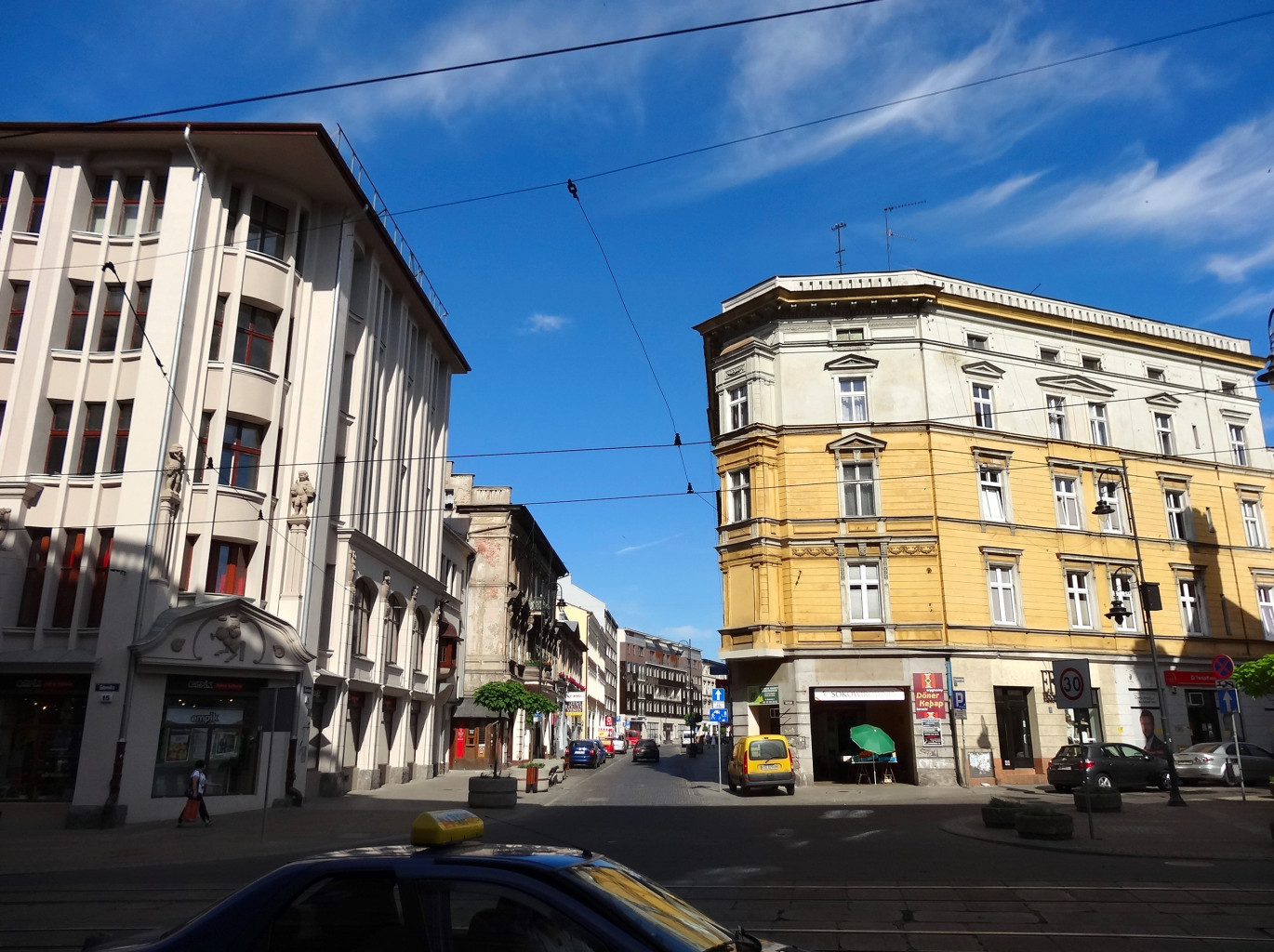 Ulica Gdańska w Bydgoszczy na odcinku między ul. Dworcową, a ul. Śniadeckich